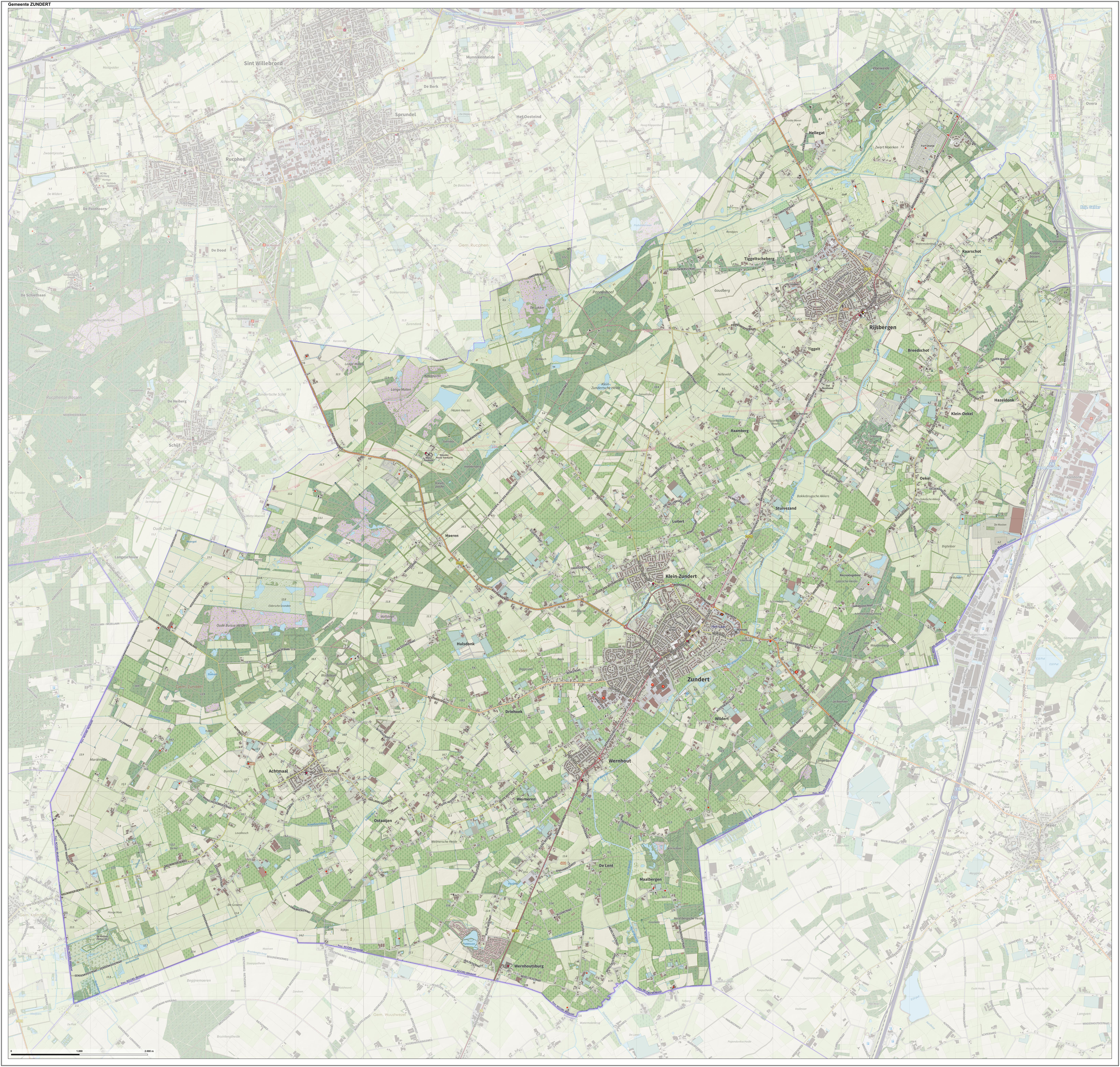 Topografische gemeentekaart. Resolutie: 400 pixels/km. Kaartbeeld samengesteld uit de open geodata van de Top10NL en Top25namen (Kadaster), Creative Commons-BY licentie. Gebouwvlakken uit open geodata BAG extract. Wegen uit de OpenStreetMap, OpenStreetMap community. Reliëfschaduw uit de Actuele Hoogtekaart AHN2. Samenstelling en kleurenschema: Jan-Willem van Aalst, met QGIS. Zie ook de Legenda.